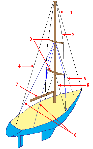 Rigg eines Segelschiffes - Laufendes Gut